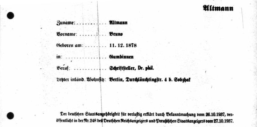 Die deutsche Bürgerschaft von Bruno Altmann für "verlustig" erklärt